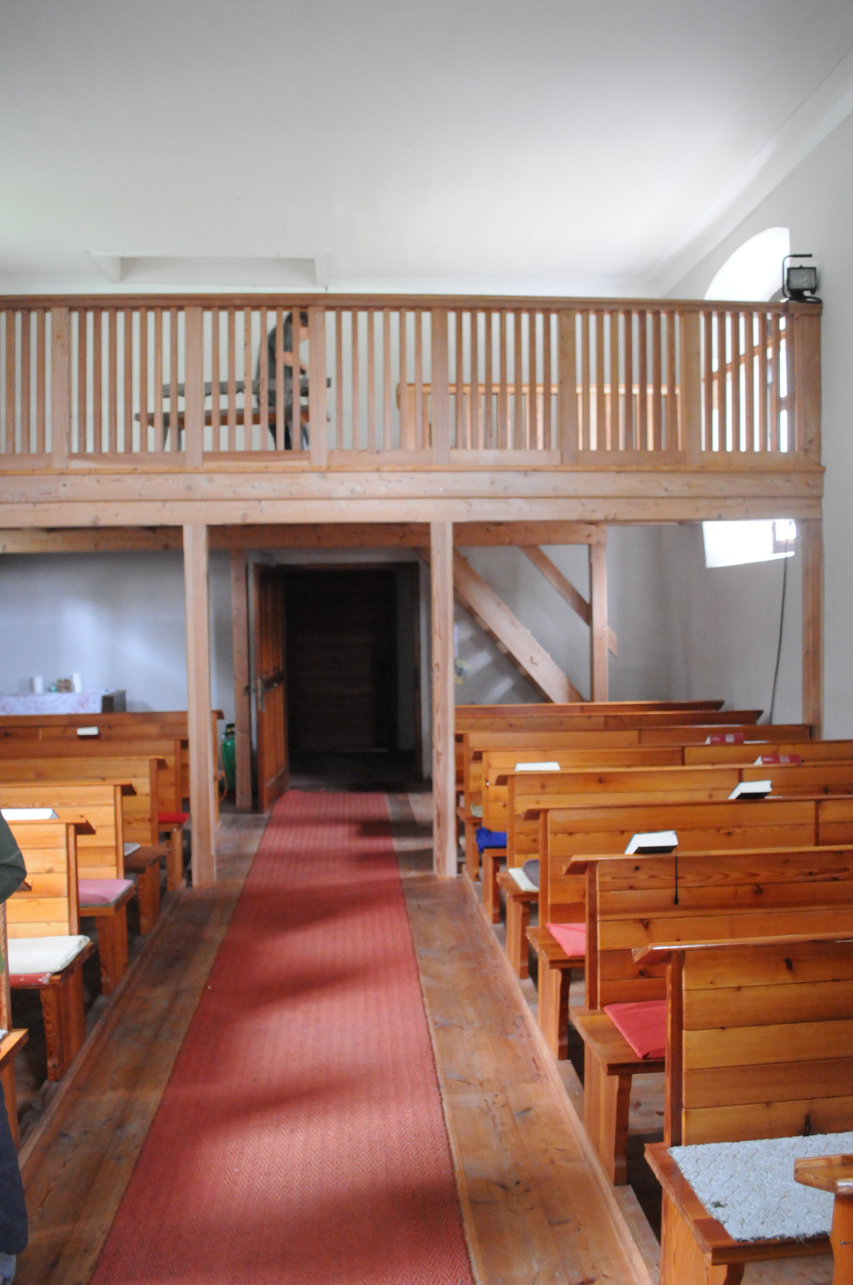 Glaubenskirche in Sankt Johann am Tauern - Innenraum mit Empore